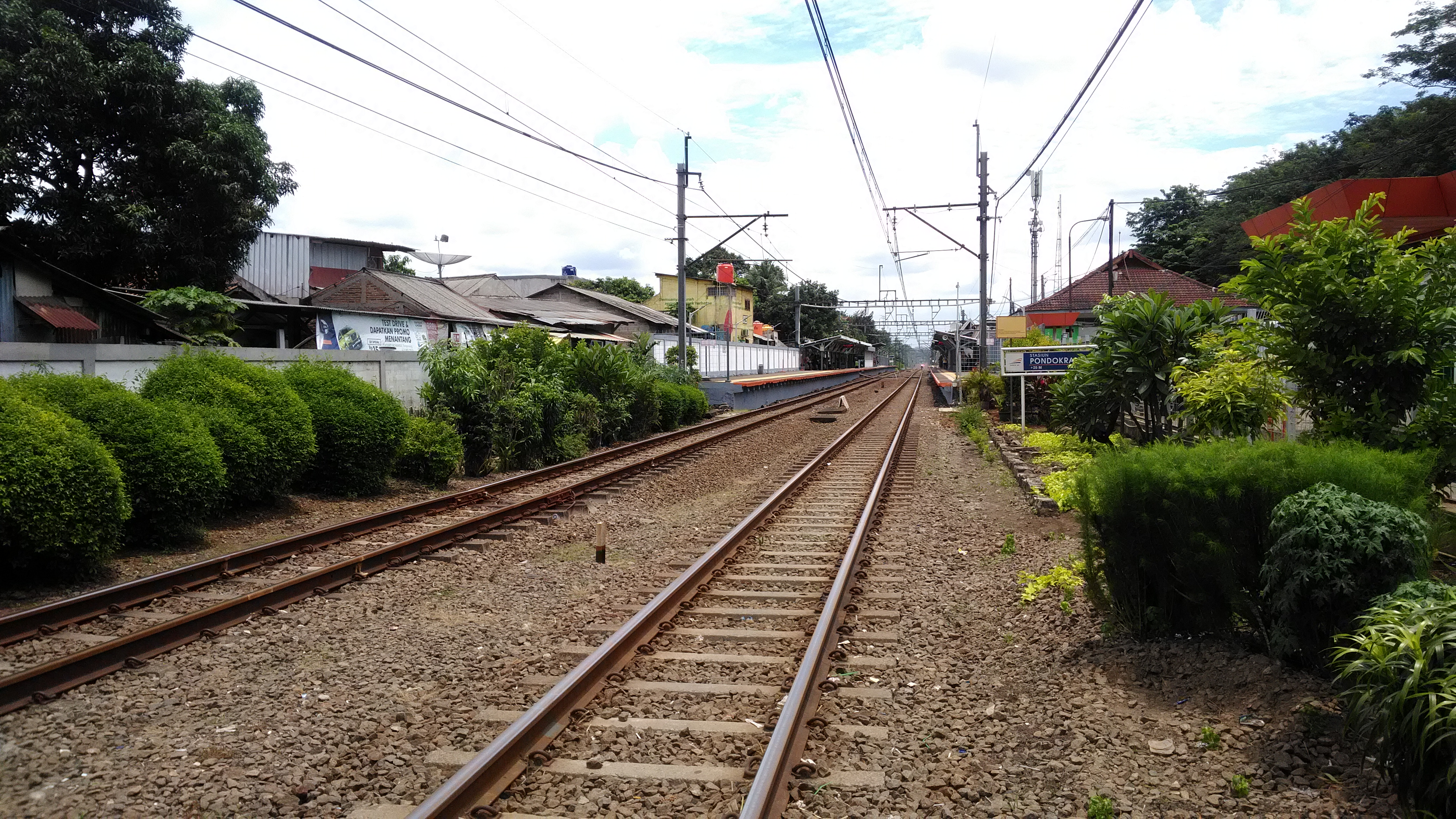 Stasiun Pondokranji dari Kejauhan